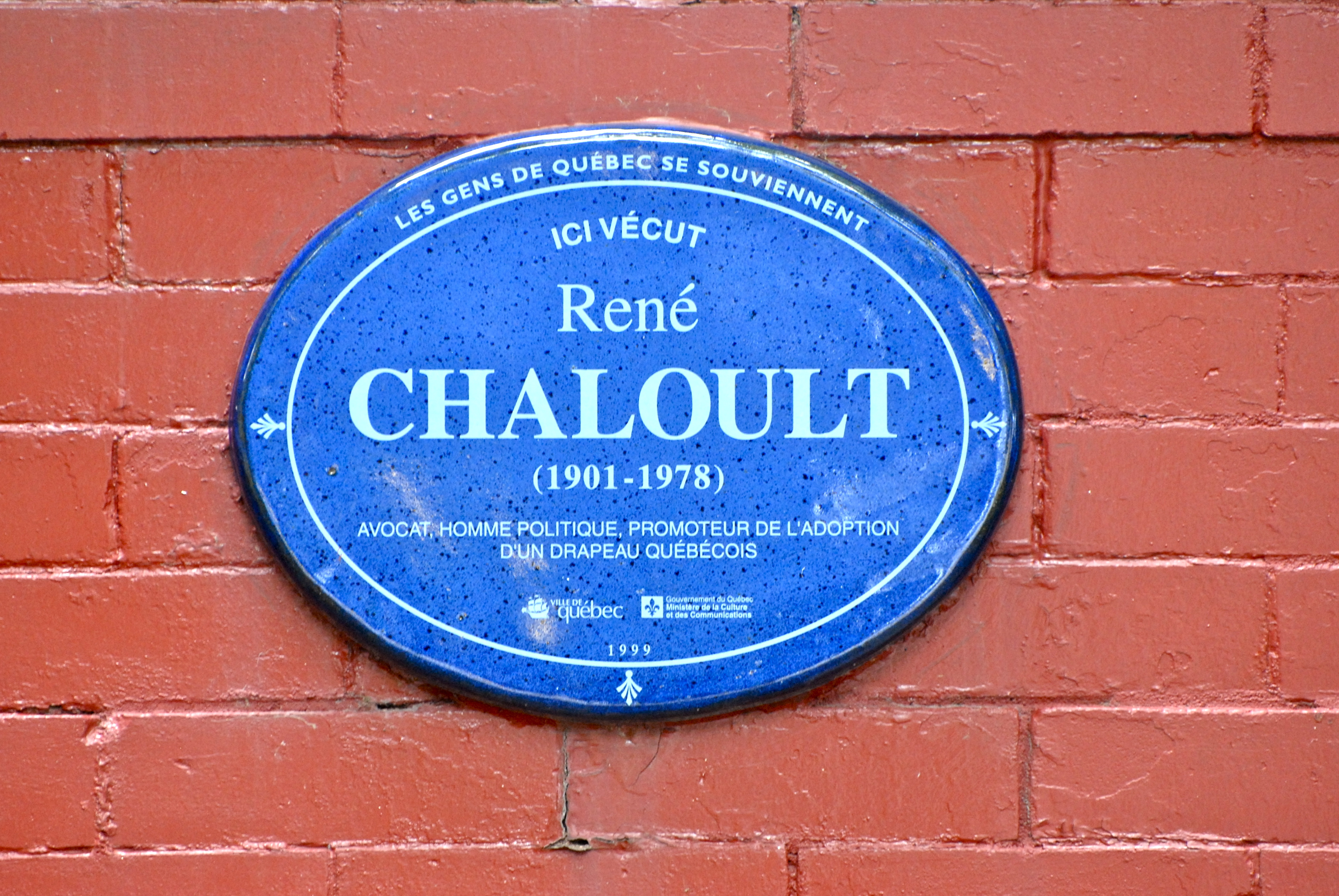 Plaque en mémoire de René Chaloult, sur une maison de l'avenue des Érables, à Québec.La maison : 1165, avenue des Érables (La Cité-Limoilou) « Ici vécut René Chaloult (1901-1978), avocat, homme politique, promoteur de l’adoption d’un drapeau québécois. »